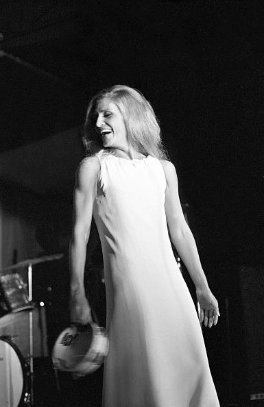 Dalida en concert à Fregene proche de Rome en Italie en 1968.